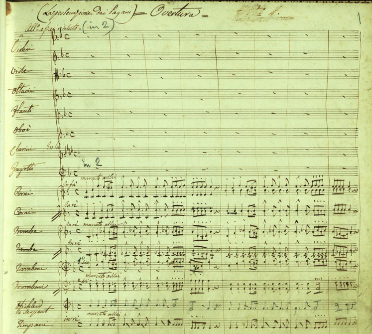 Manoscritto autografo dell'ouverture della cantata Eudossia e Paolo di Teodulo Mabellini (1817-1897), conservato nel Conservatorio di Firenze